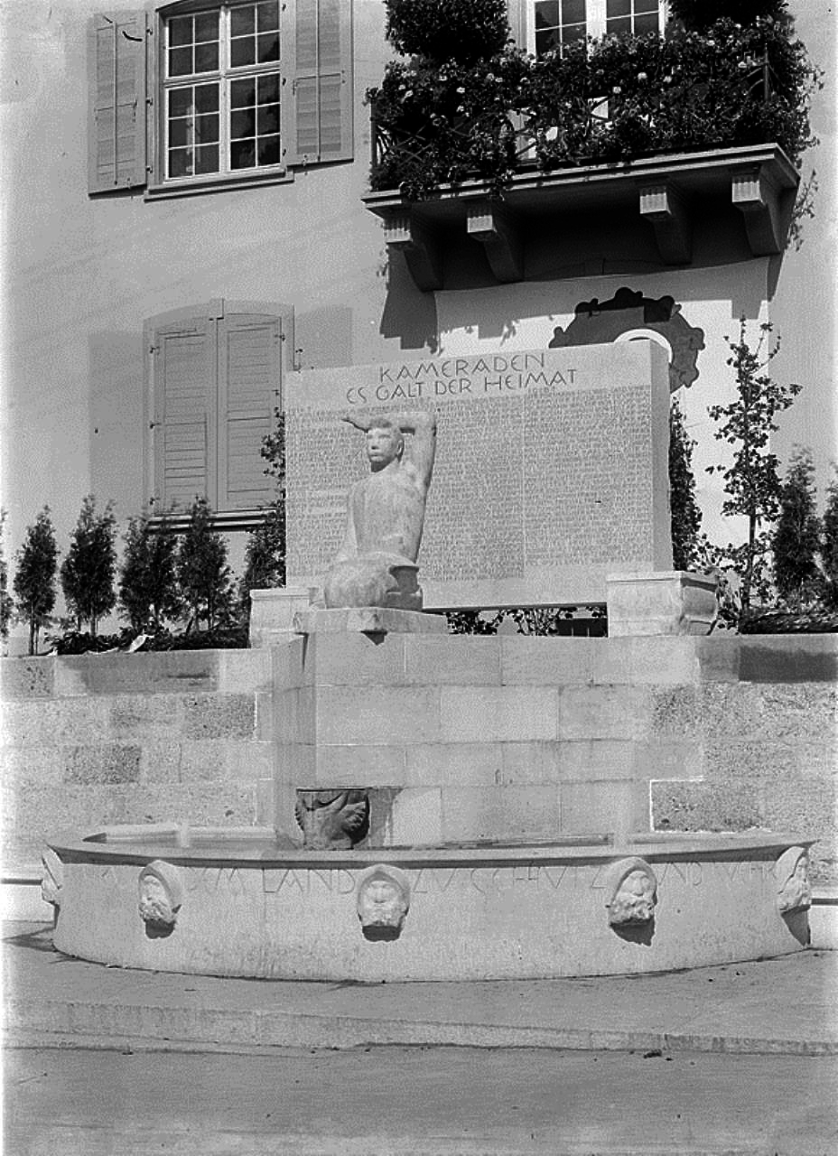 Ursprüngliche Fassung des Wehrmannsdenkmal in Liestal, wo auch die Urne von Jakob Probst in die Mauer eingelassen ist. Das Denkmal wurde symbolträchtig am 26. August 1923, am Tag der Schlacht bei St. Jakob an der Birs von 1444, eingeweiht